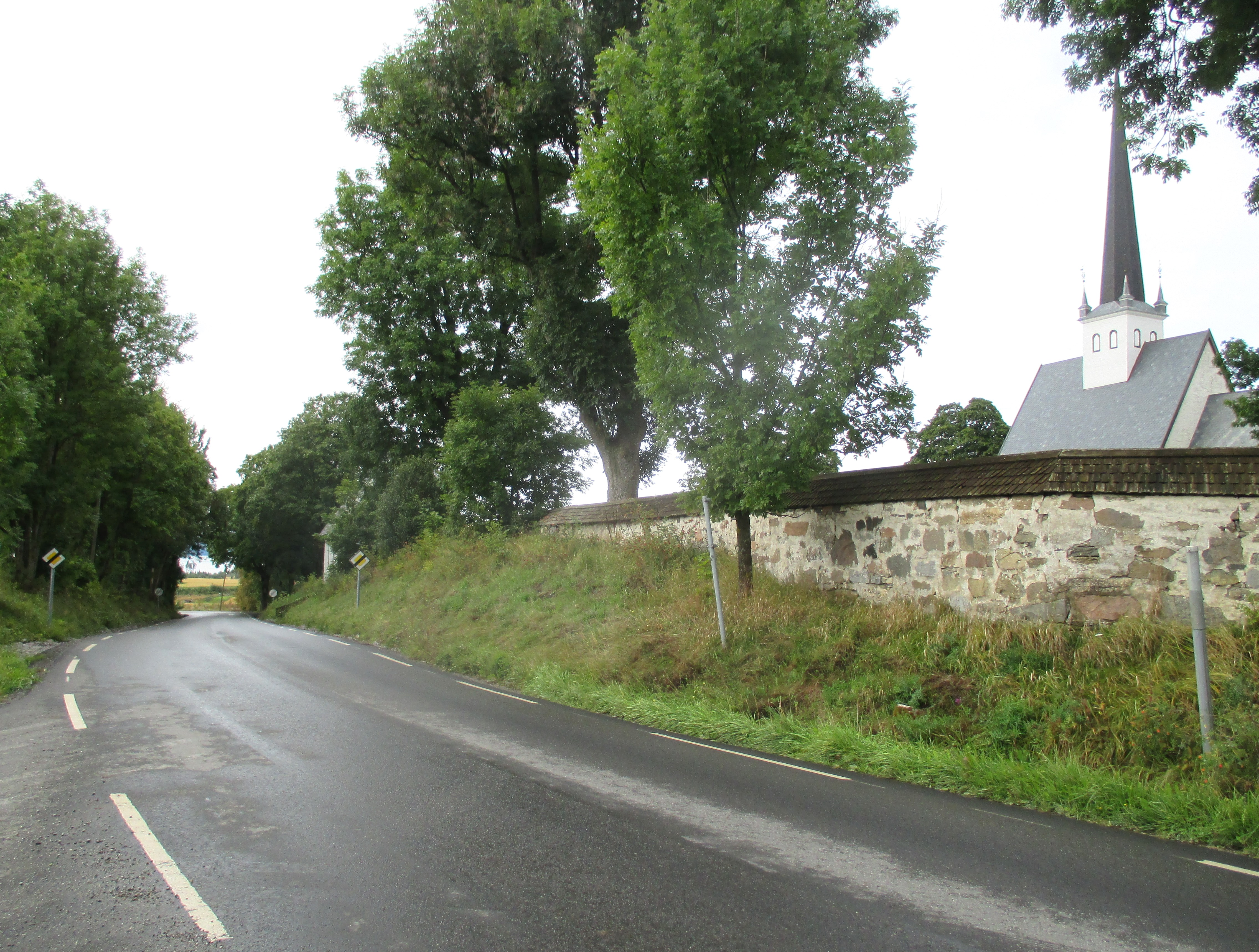 Kirkevegen (FV1864, tidl. FV199) ved Stange kirke